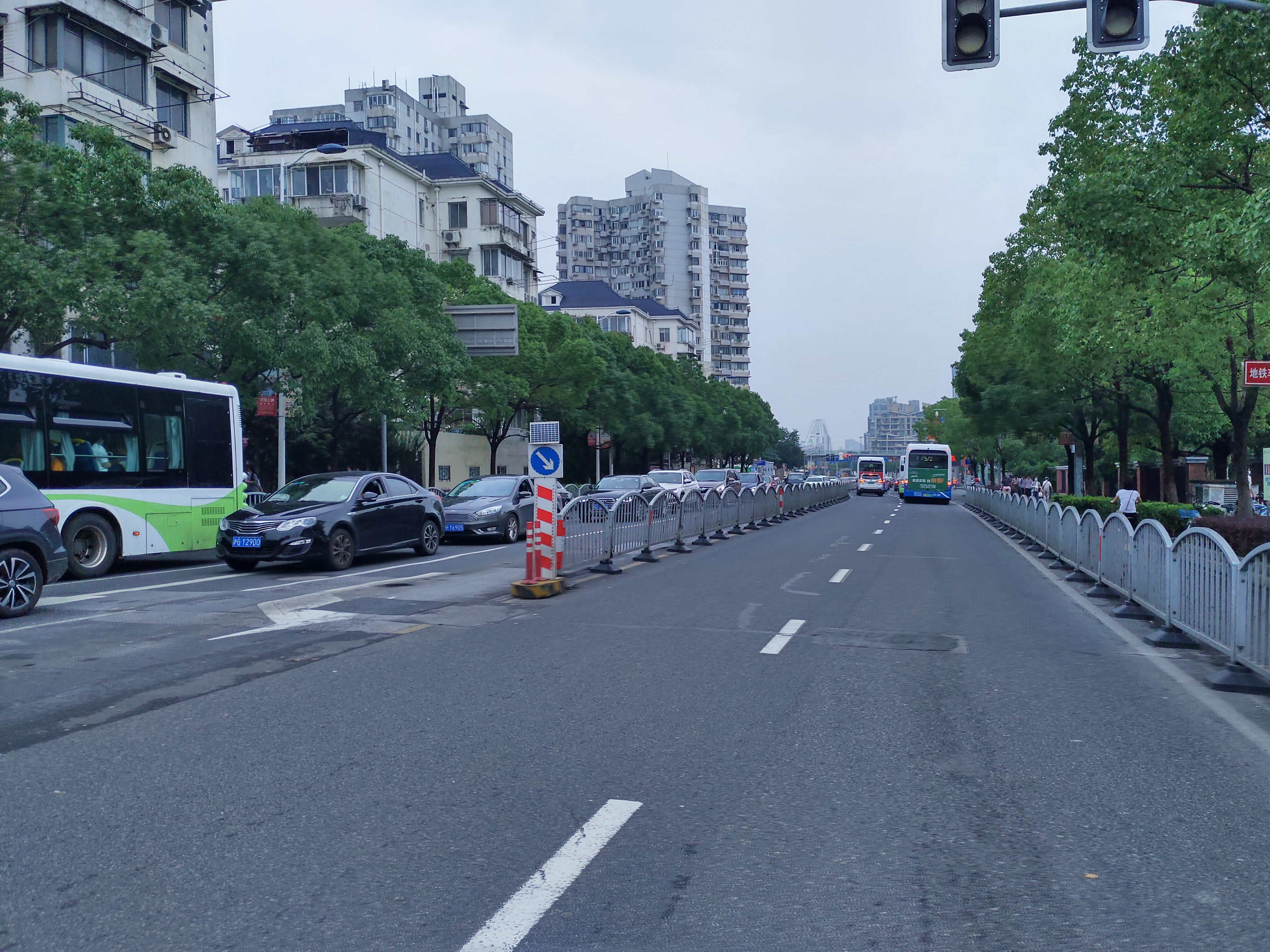 上海长清路街景Changqing Road, Shanghai, Jun 2020